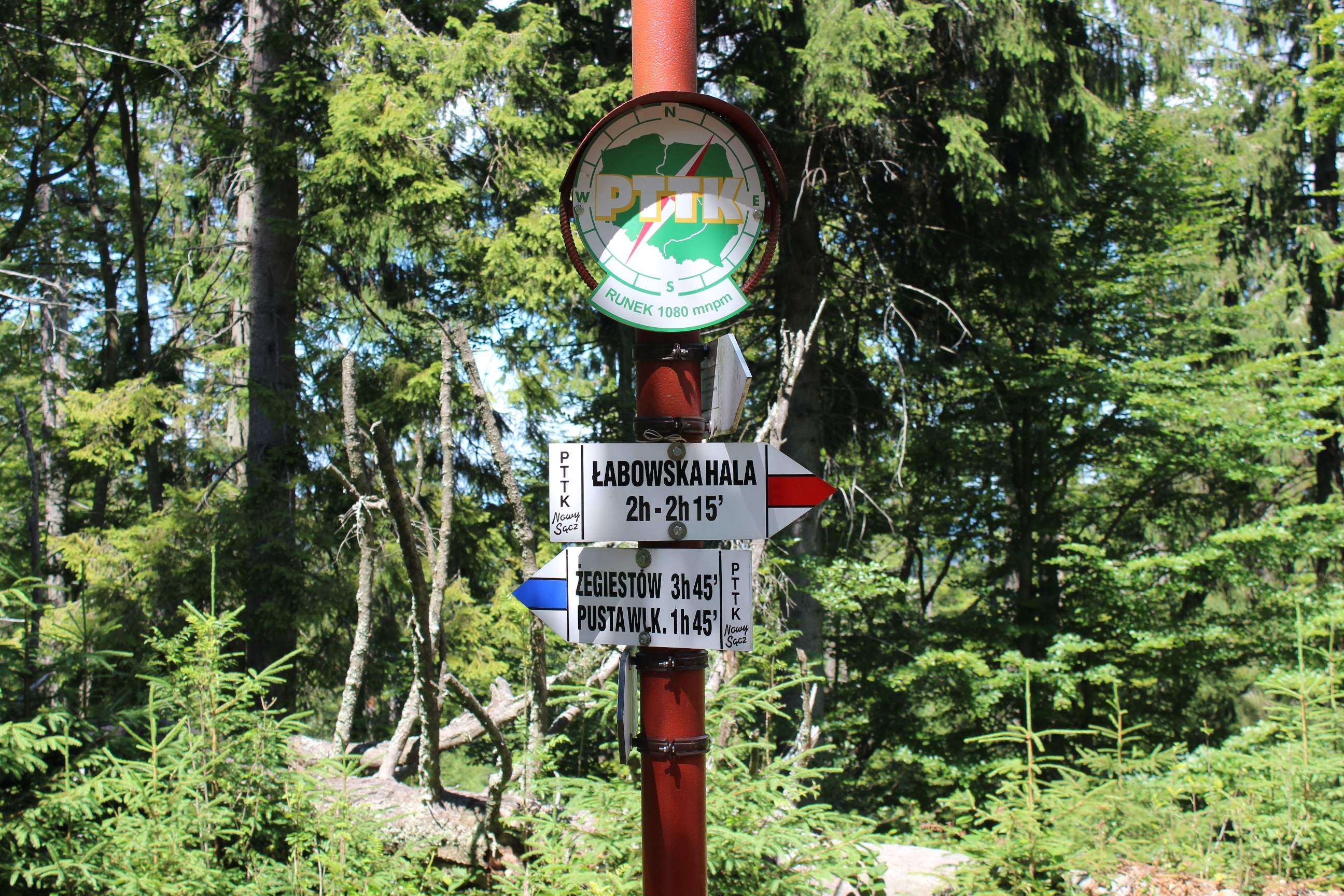 Runek - Beskid Sądecki